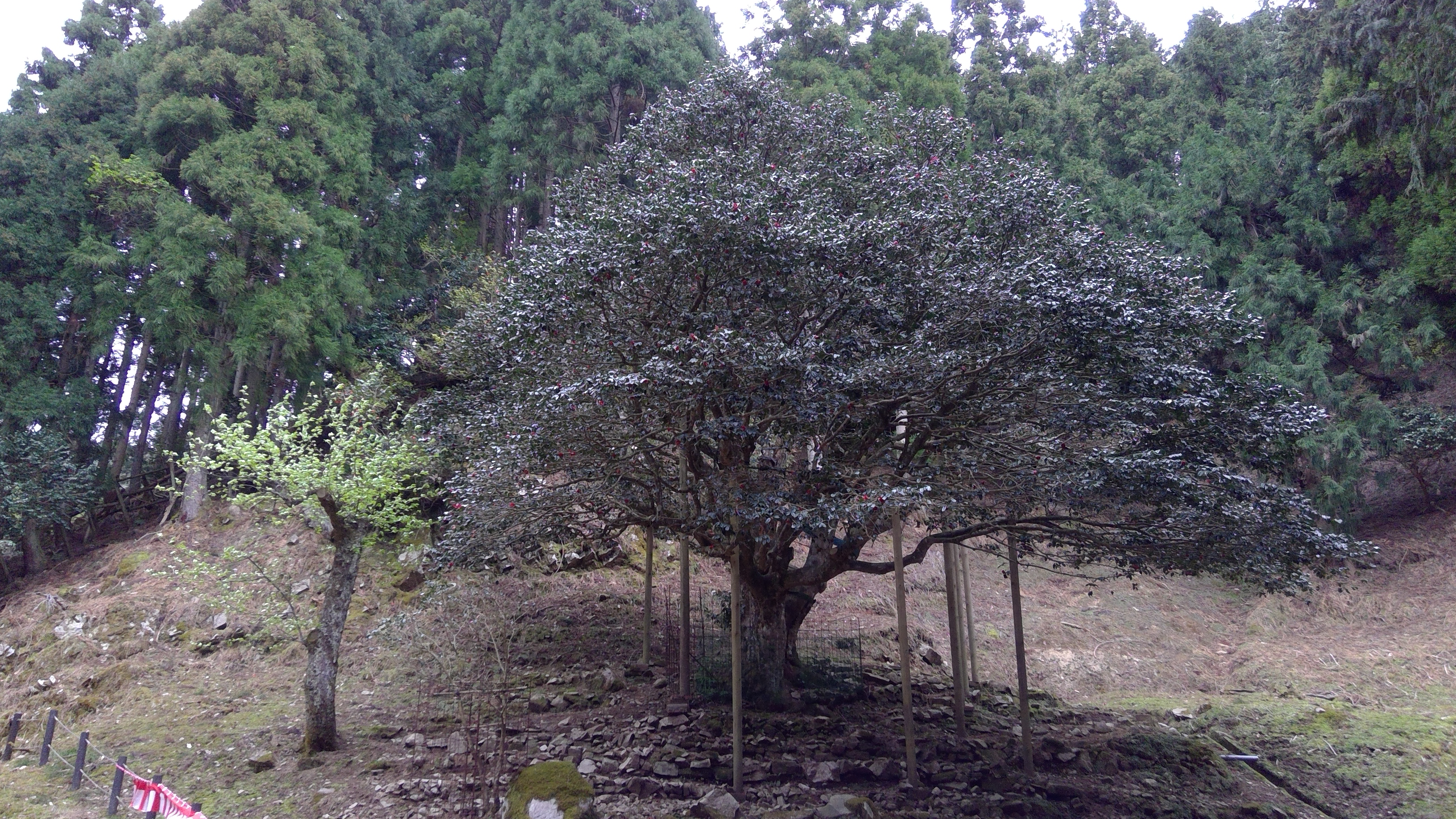 「千年椿」の愛称で親しまれる京都府与謝野町滝にあるヤブツバキの巨木